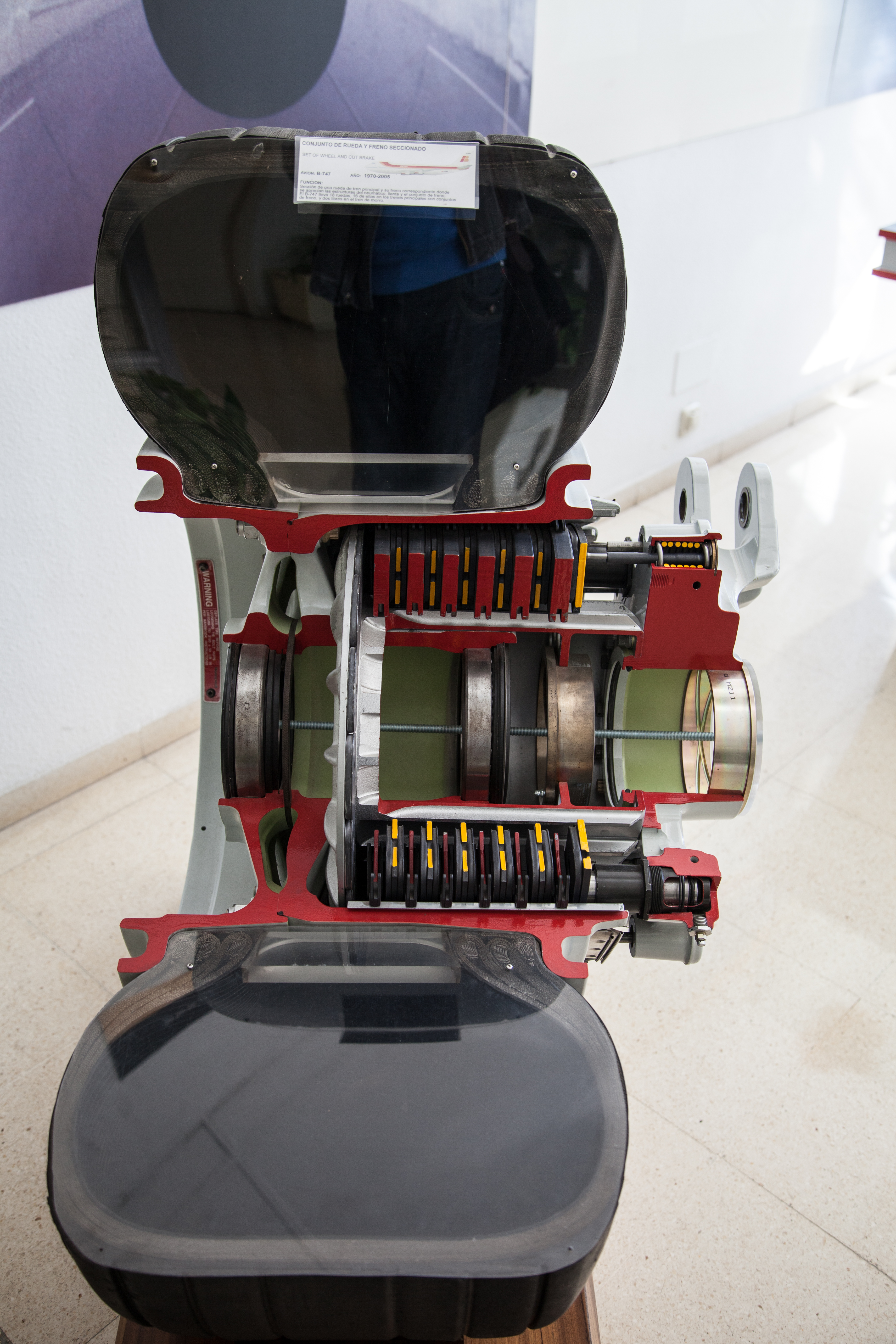 Iberia, La Muñoza-Madrid